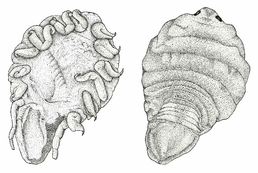 Artystone trysibia Isopodo Cymothoidae hectoparacito de peces en Venezuela